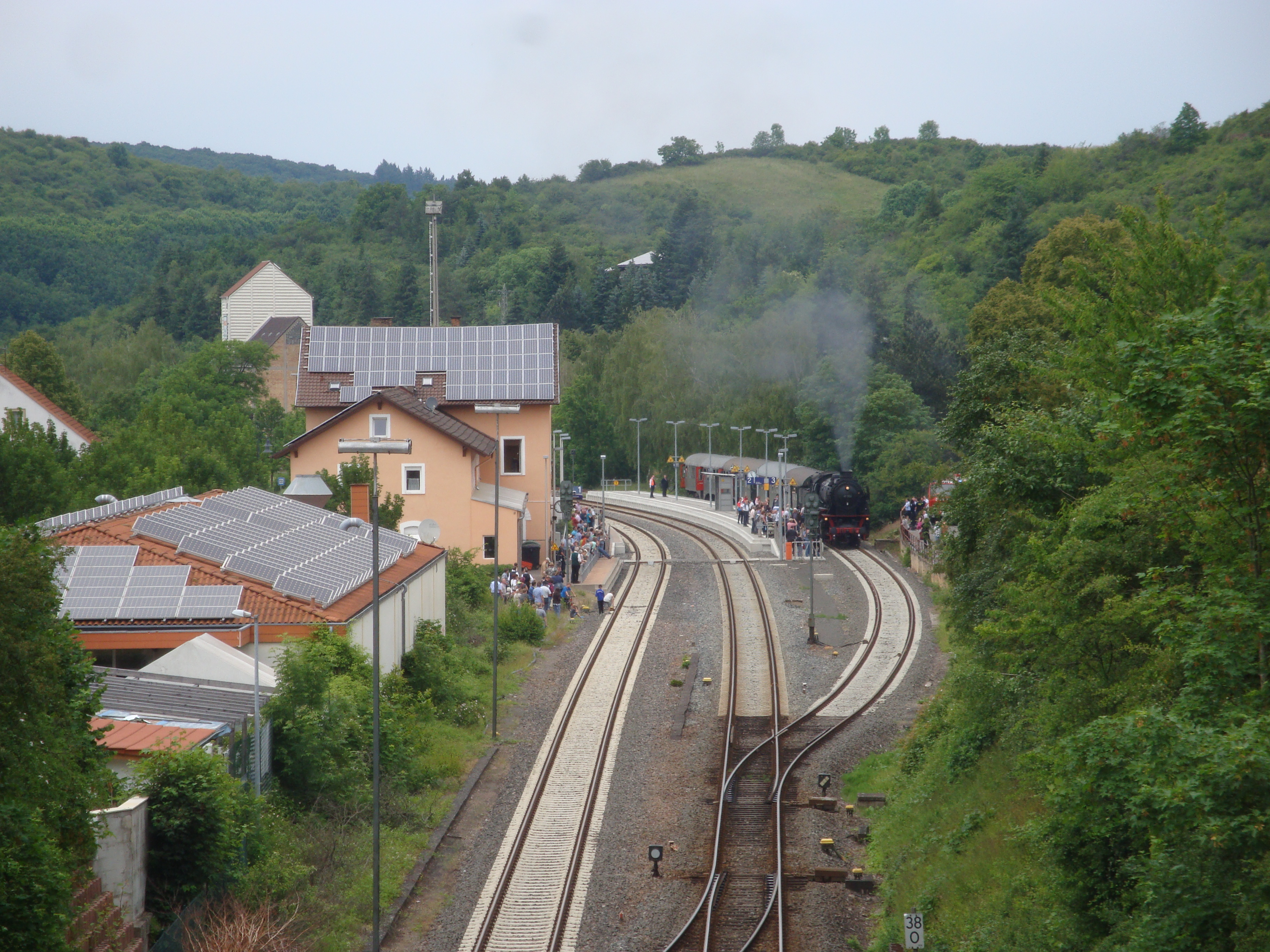 Bahnhof Alsenz ( Dampfspektakel 2014 )